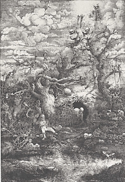 La comédie de la Mort Sonstiges: Wiedergabe eines Drucks von 1854, ich vermute das ist PD (Schutzdauer) La comédie de la Mort (Druck von 1854) von Rodolphe Bresdin (* 17. März 1825 in Ingrande; † 14. Januar 1885 in Sèvres; Künstlername auch Chien-Caillou); war ein französischer Graphiker, der durch seine detailreich ausgearbeiteten Darstellungen der Natur, häufig als Hintergrund biblisch-religiöser Motive, bekannt wurde. Er gilt als Wegbereiter phantastisch-visionärer Darstellungsformen in der Romantik und wird deshalb manchmal auch als Protosurrealist bezeichnet. Miese Auflösung